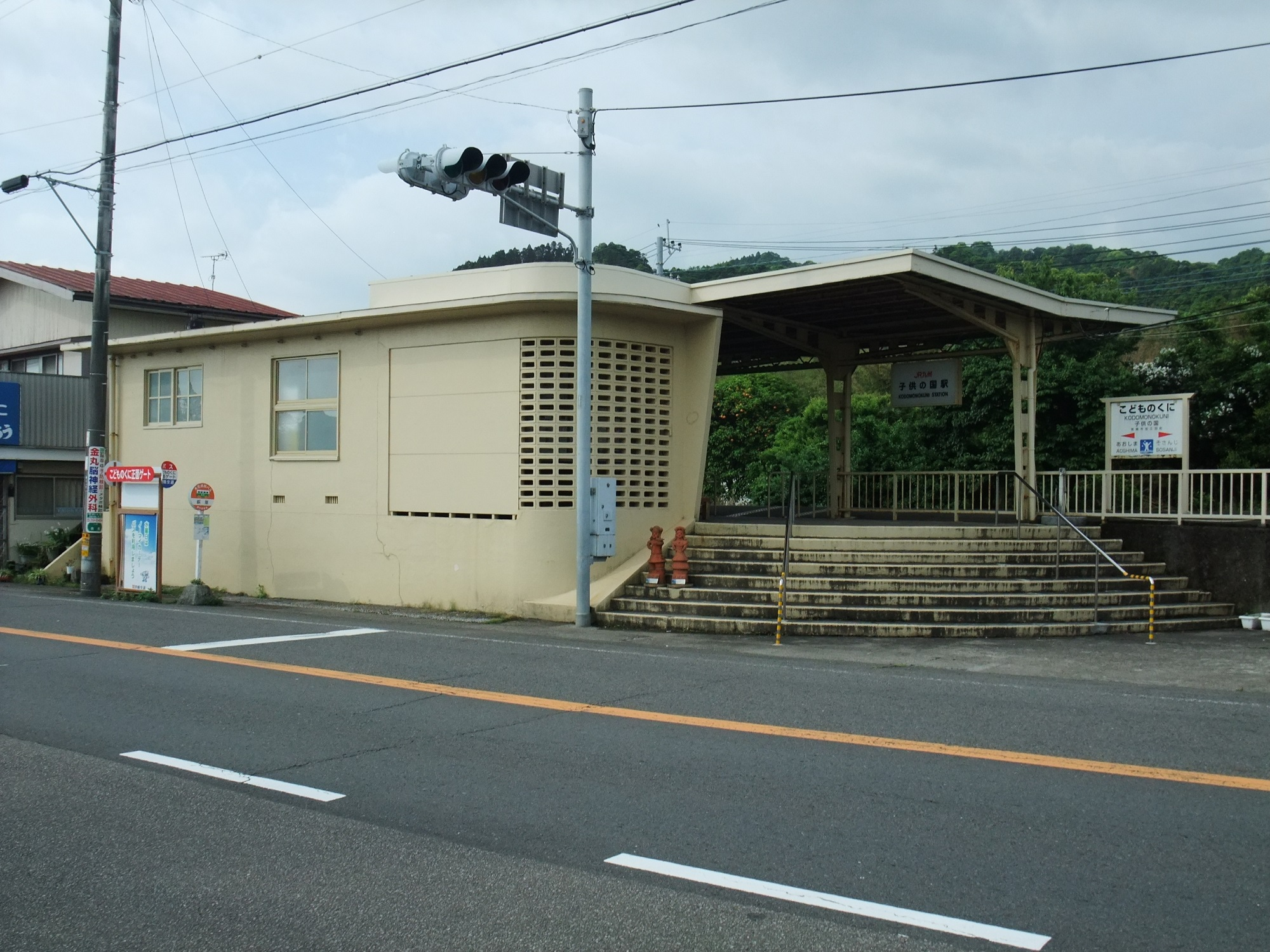 日南線子供の国駅